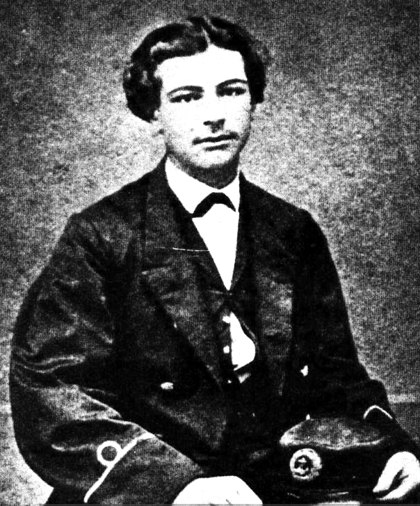 Arturo Prat,a los 16 años en la Escuela Naval